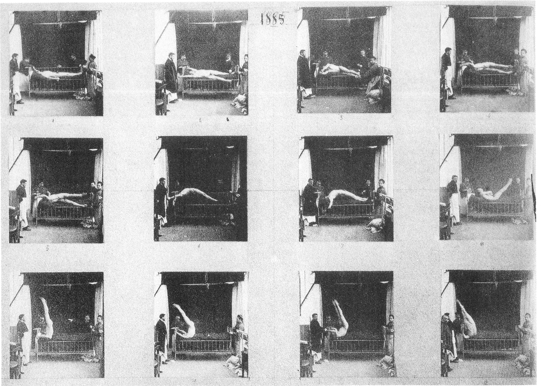 Albert Londe: Hysterieanfall beim Menschen, chronofotografische Bilderfolge, Labor des Hôpital de la Salpêtrière, Paris, 1885